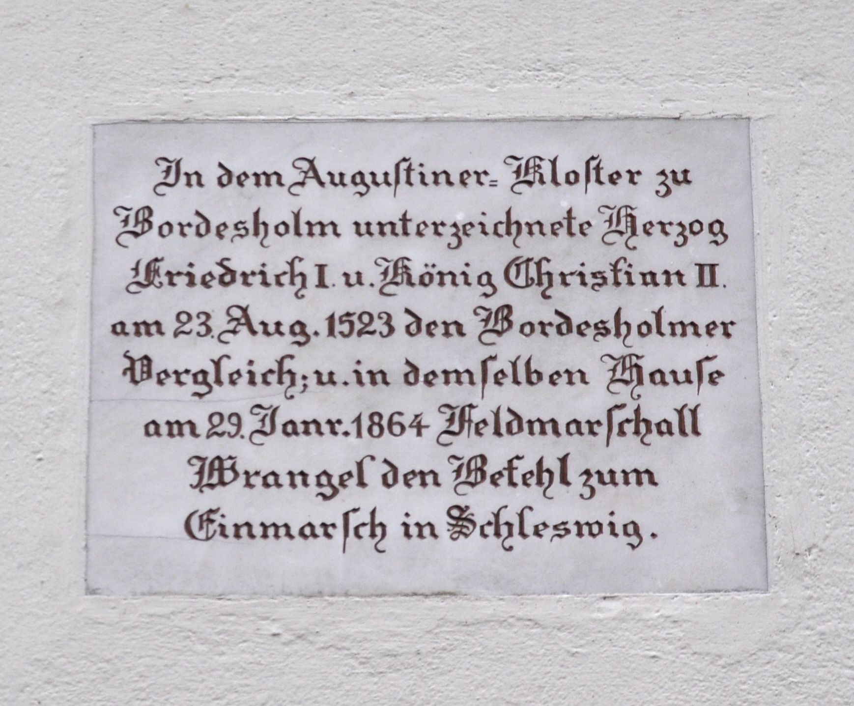 Bordesholm, Gedenktafel am Klosterstift; In dem Augustiner-Kloster zu Bordesholm unterzeichnete Herzog Friedrich I. u. König Christian II. am 23. Aug. 1523 den Bordesholmer Vergleich; u. in demselben Hause am 29. Janr. 1864 Feldmarschall Wrangel den Befehl zum Einmarsch in Schleswig.